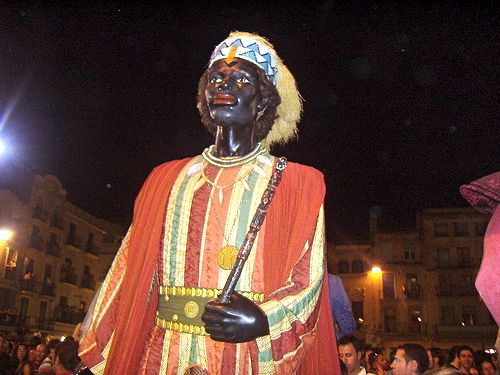 El gegant Negre ballant a la plaça del Mercadal de Reus